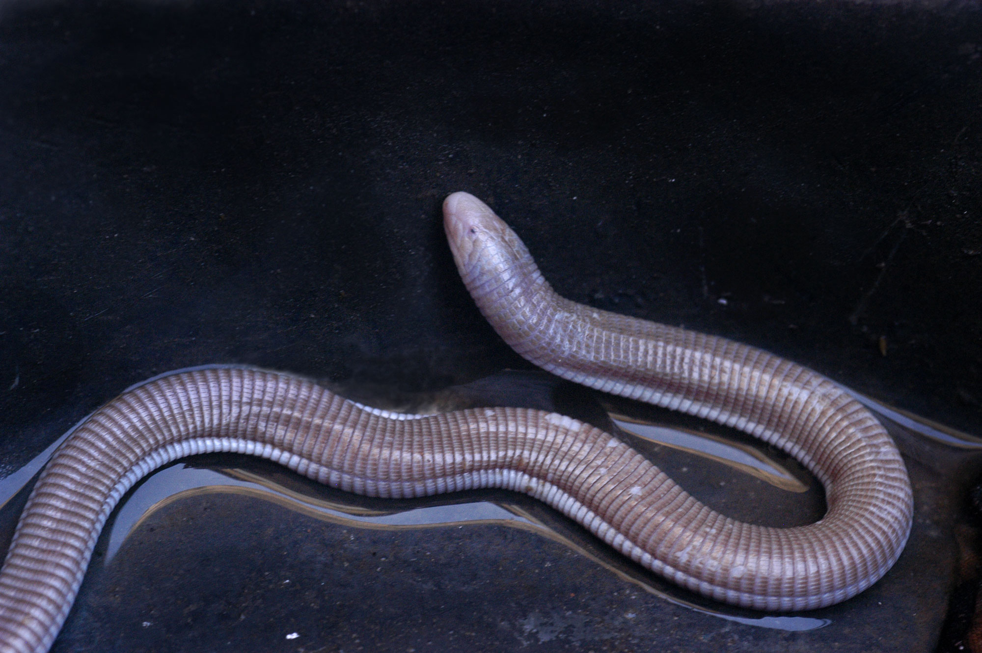 "cobra de duas cabeças" Amphisbaenia